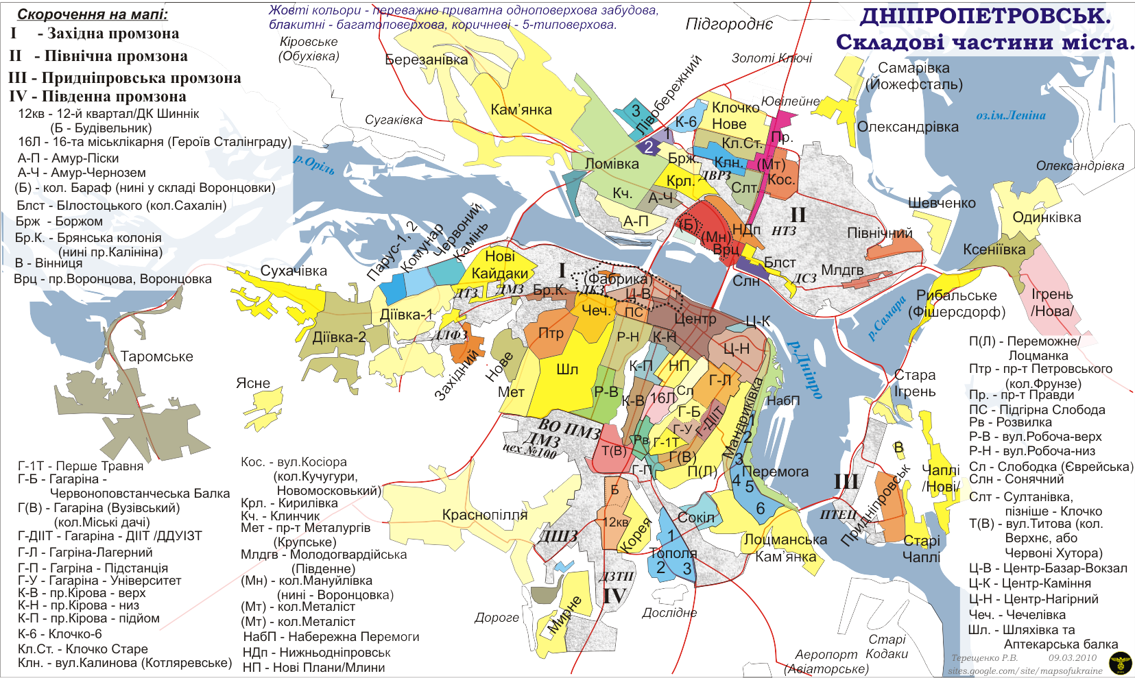 Селища, житлові масиви, мікрорайони, з яких складається м.Дніпропетровськ